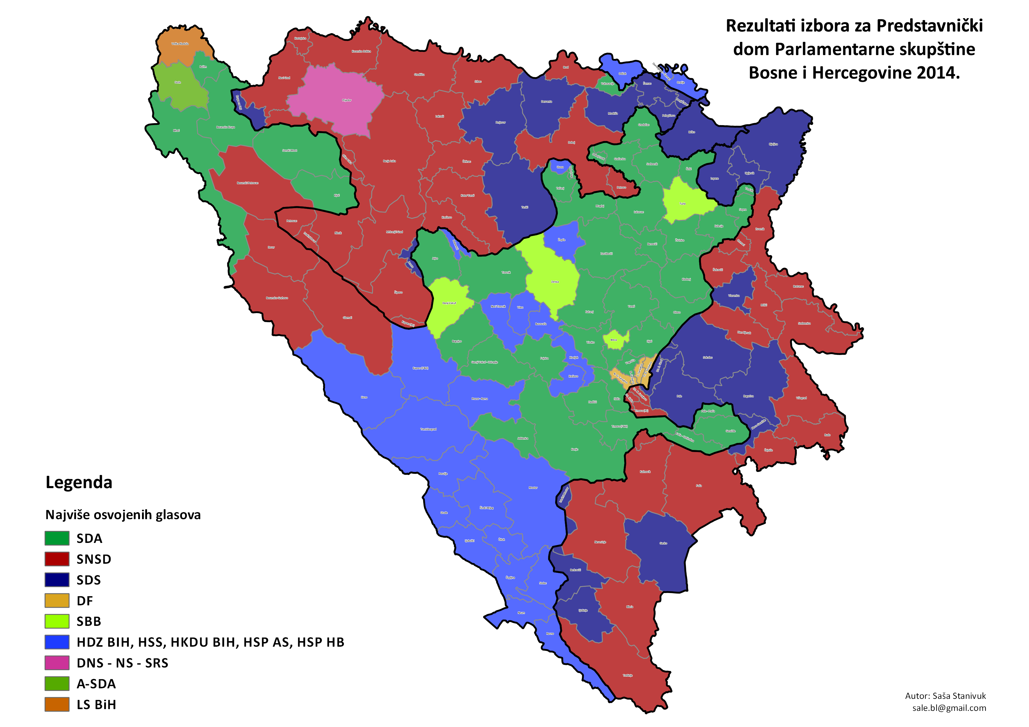 Srpskohrvatski / српскохрватски: Izbori za Parlamentarnu skupštinu BiH 2014. godine